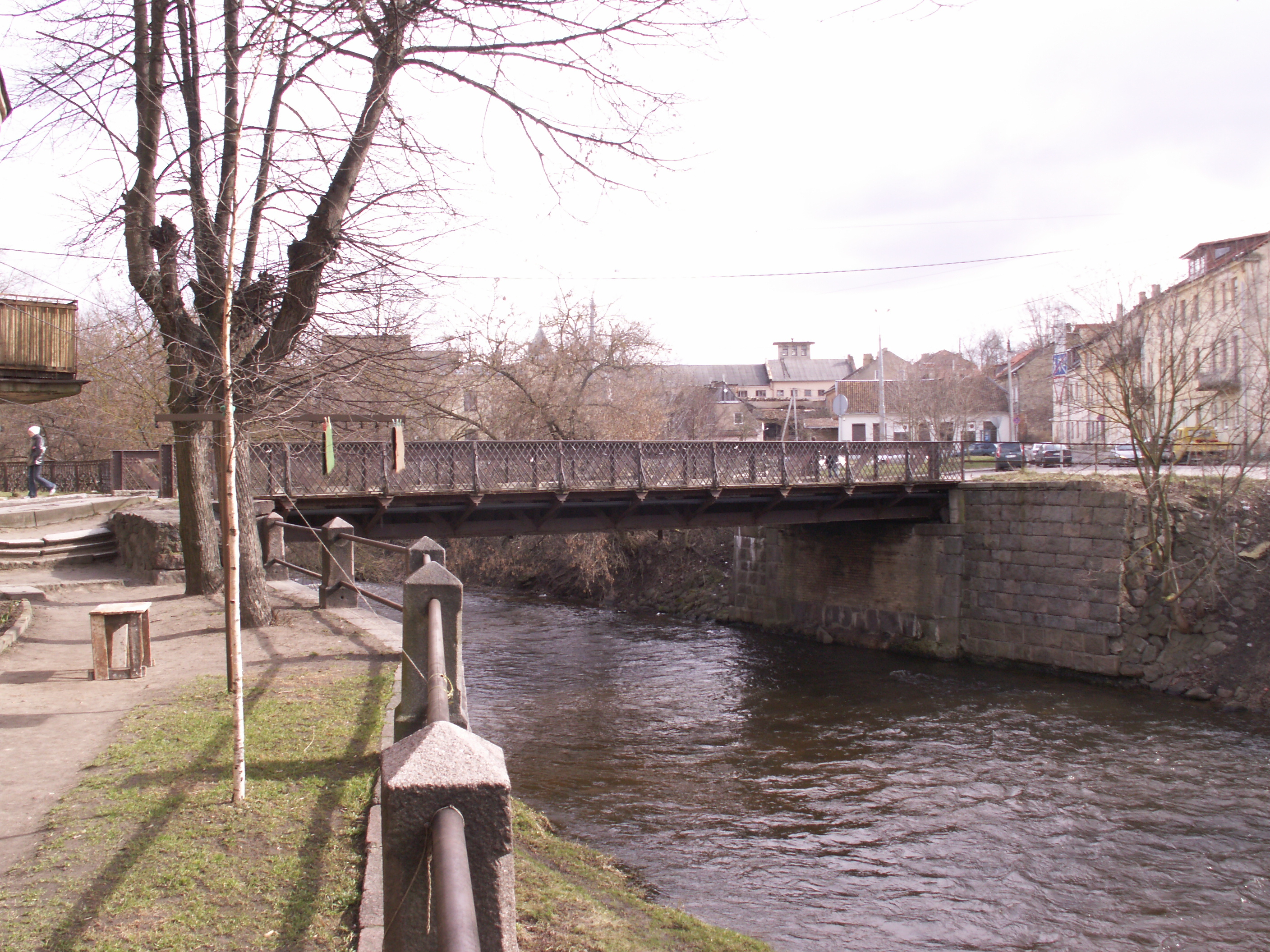 Paplaujos tiltas